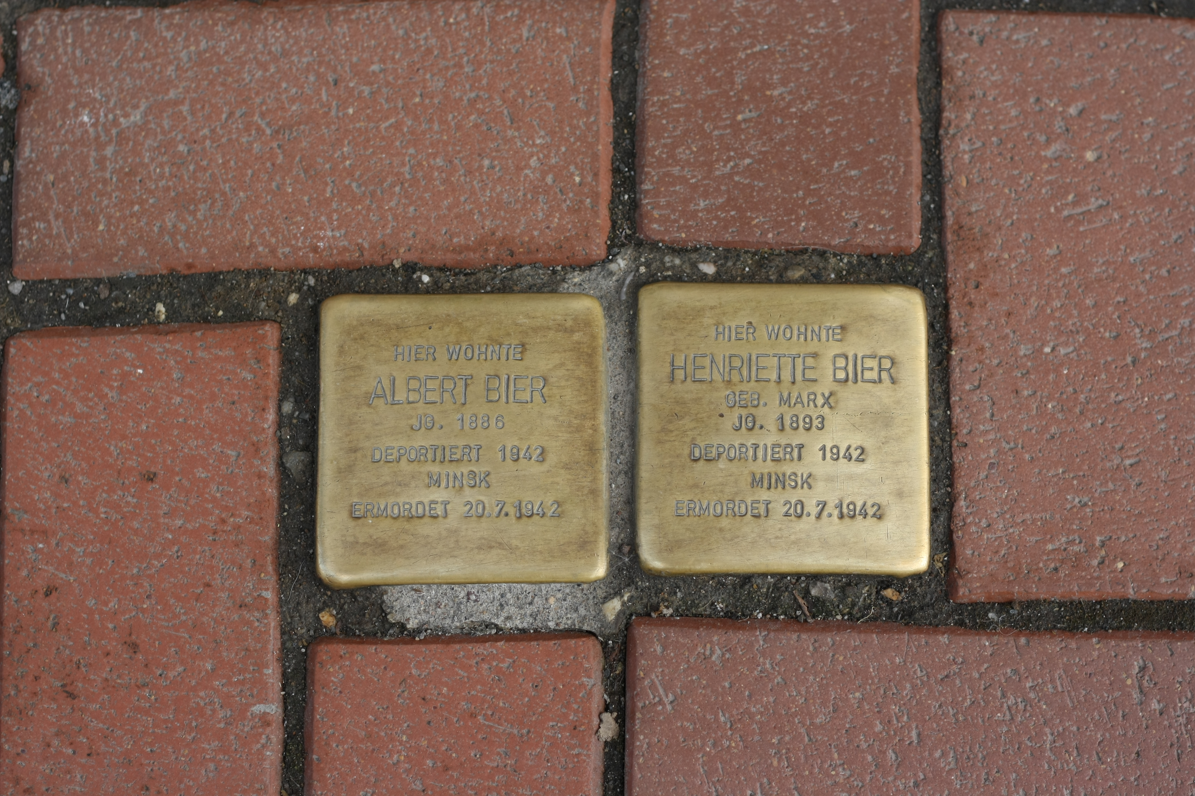 Stolpersteine in Meckenheim (vor dem Haus Hauptstraße 55) für Albert Bier Jg. 1886 und Henriette Bier geb. Marx Jg. 1893